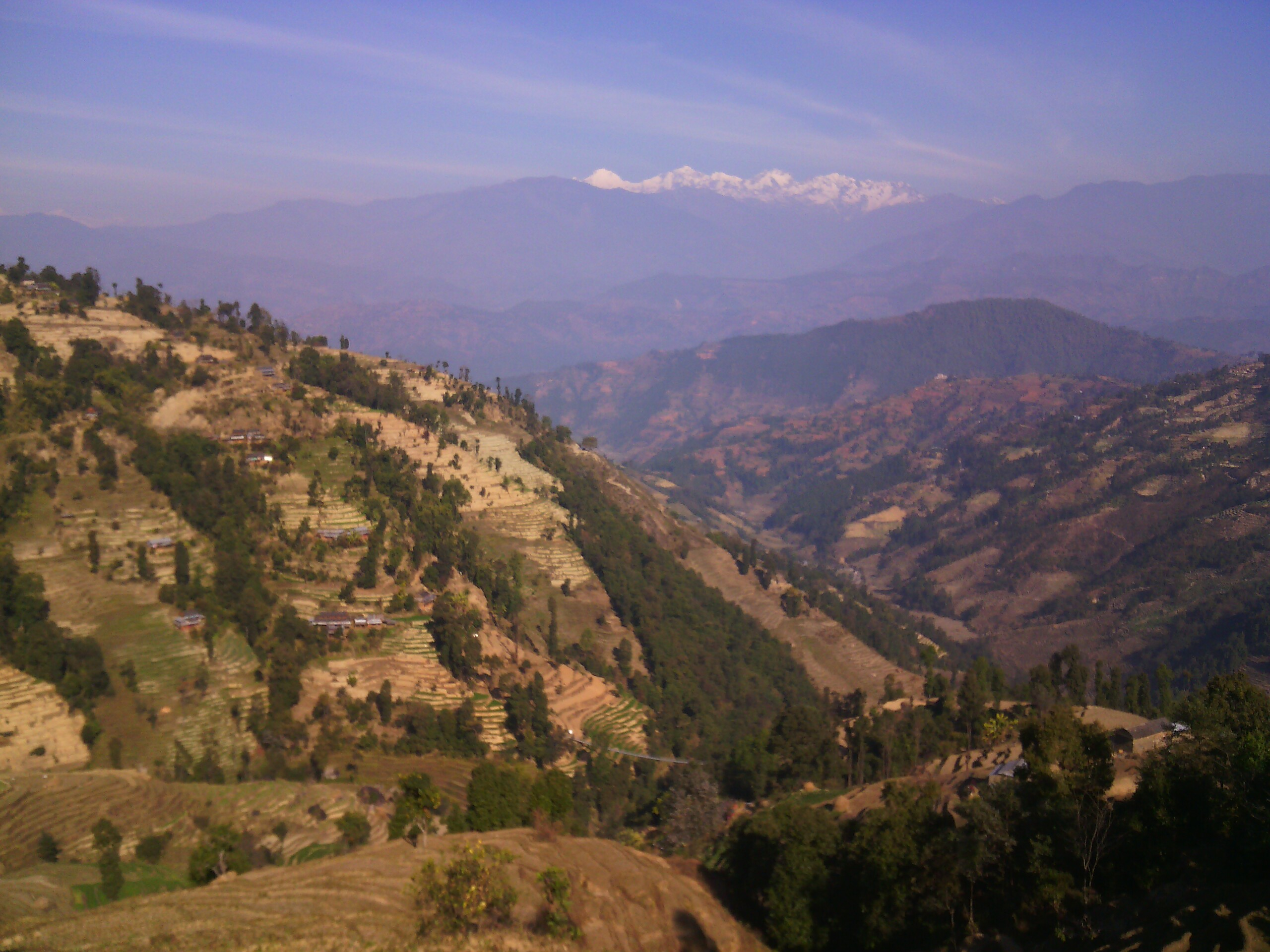 नेपाली: नुवाकोटबाट देखिएको हिमालको दृष्य